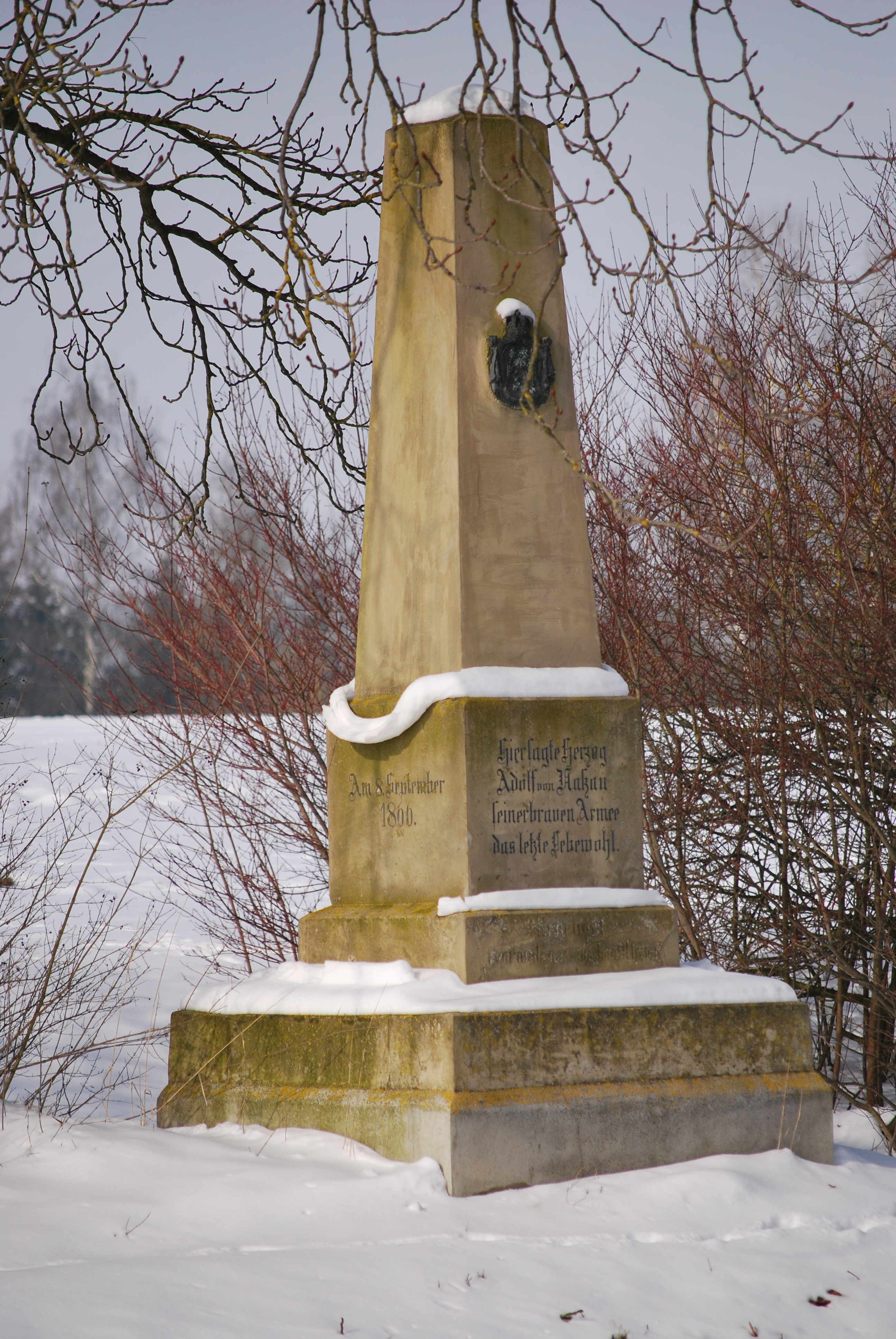 "Nassauer Denkmal" zwischen Bubesheim und Günzburg gewidmet dem Herzog Adolph V. von Nassau